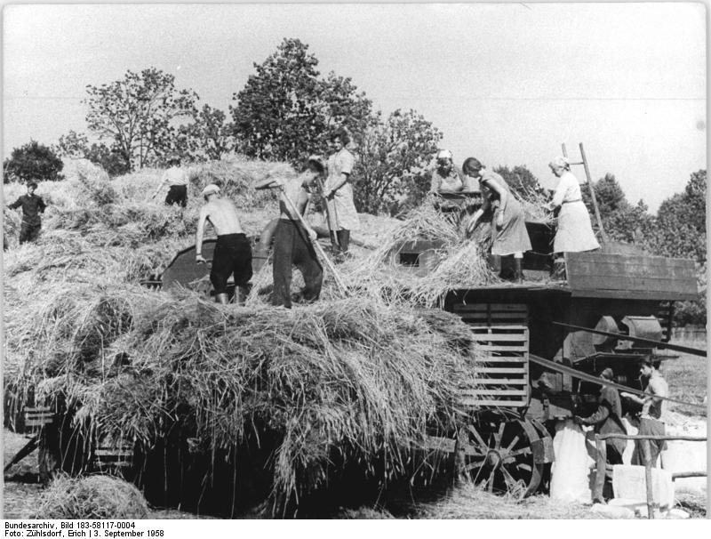 Geestgottberg, beim Dreschen Zentralbild Zühlsdorf 3.9.1958 Vom Bauplatz der Jugend in der Wische. Auf dem Bauplatz der Jugend in der altmärkischen Wische sind insgesamt 165 km Gräben instandgesetzt worden. Bis zum 30. September 1958, dem letzten Tag des diesjährigen Wischeeinsatzes, sollen 175 km Wasserläufe in Ordnung gebracht sein. Seit dem 15. Mai, dem Beginn der großen Aktion in der altmärkischen Wische, sind von den jungen Sozialisten außer den Grabenaufräumungsarbeiten acht Rinderoffenställe, drei Silos und ein großer Düngerschuppen gebaut, sowie 14, 2 km Straßen instandgesetzt worden. Neben einer Vielzahl von Einsätzen in der Landwirtschaft halfen die Jugendlichen nach Feierabend noch insgesamt 18000 Stunden beim Nationalen Aufbauwerk. UBz: 10 Jugendliche von der Brigade aus dem Kreise Oschersleben neben Mitarbeitern der BHG und des Rates des Bezirks Magdeburg, helfen beim Drusch in der LPG Neues Deutschland in Geestgottberg.